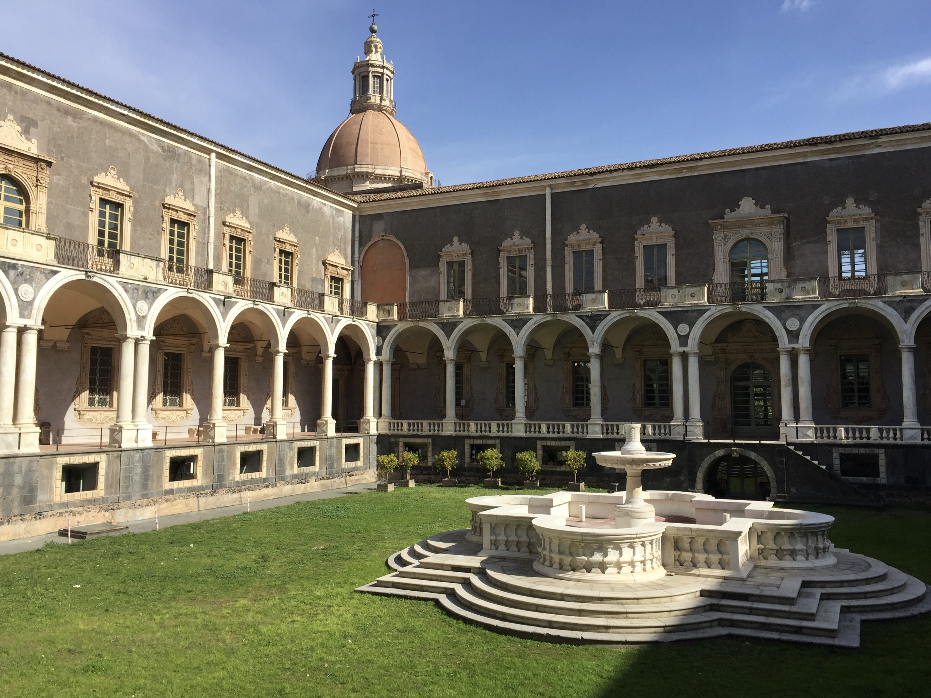 Benediktinerkloster von San Nicolò l’Arena, Catania: westlicher Kreuzgang mit Brunnen und Kuppel der Kirche